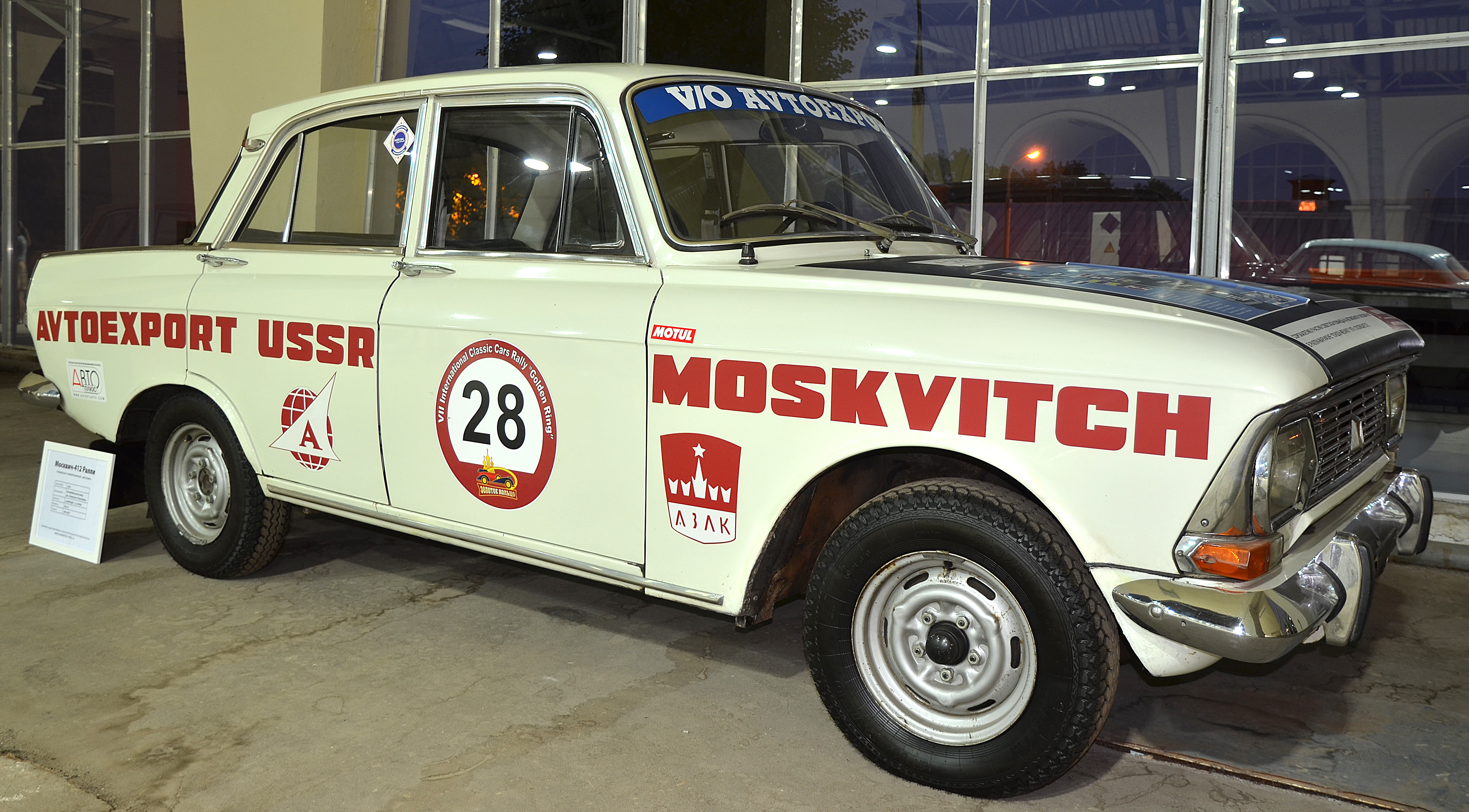 Можно увидеть здесь : You can see here